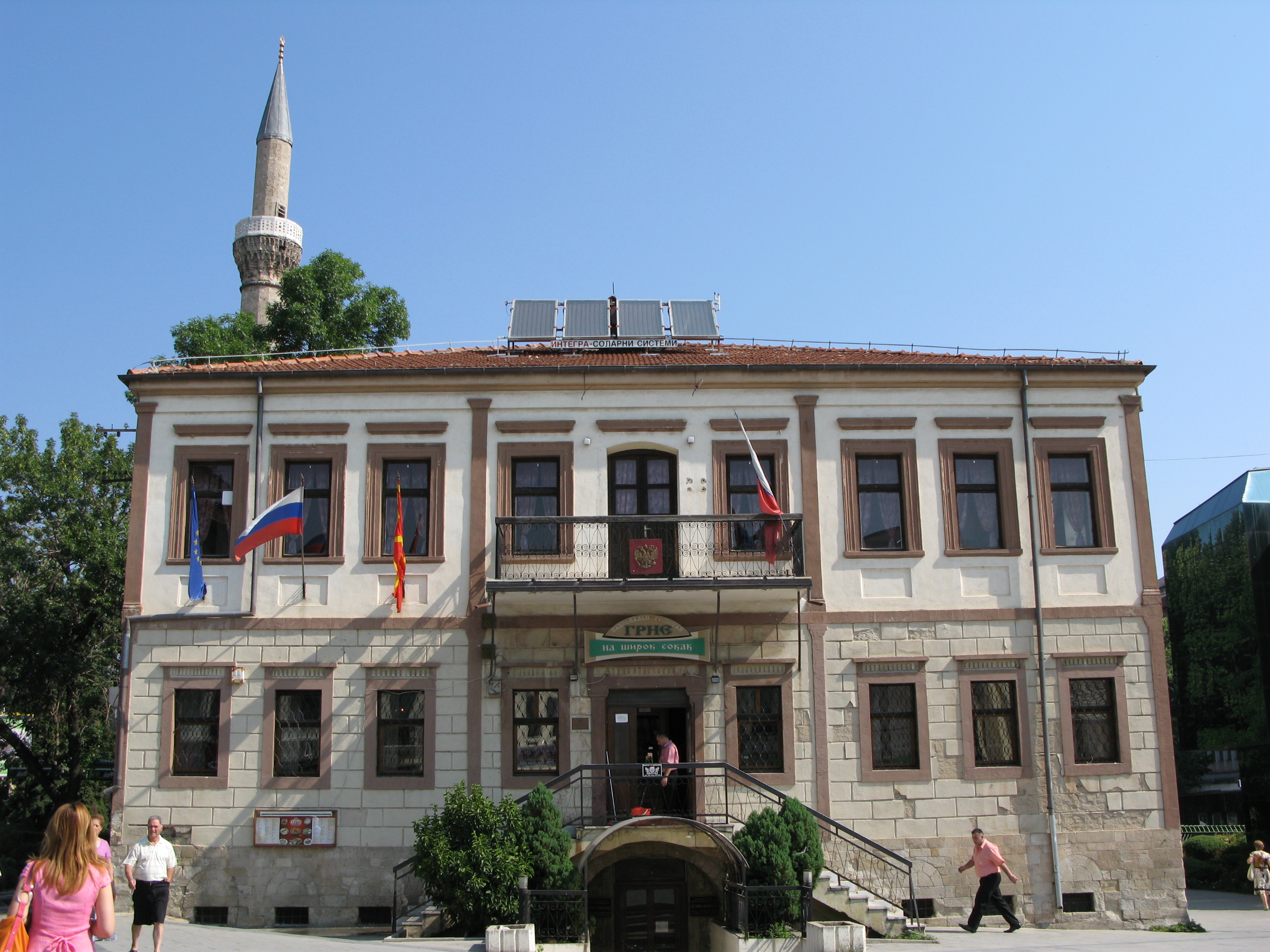 Магнолија, руска амбасада. Битољ (2008). Сада се зграда руске амбасаде налази на другом месту поред трга Магнолија (2017)